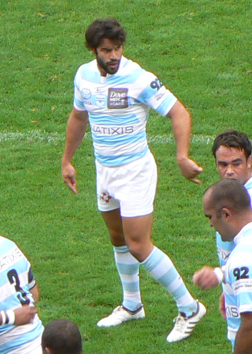 Le rugbyman français Jérôme Fillol affronte l'ASM Clermont Auvergne avec le Racing Métro 92 au stade Marcel Michelin de Clermont-Ferrand.